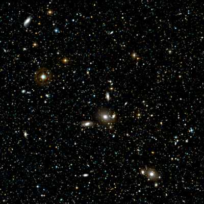 Ammasso della Macchina Pneumatica